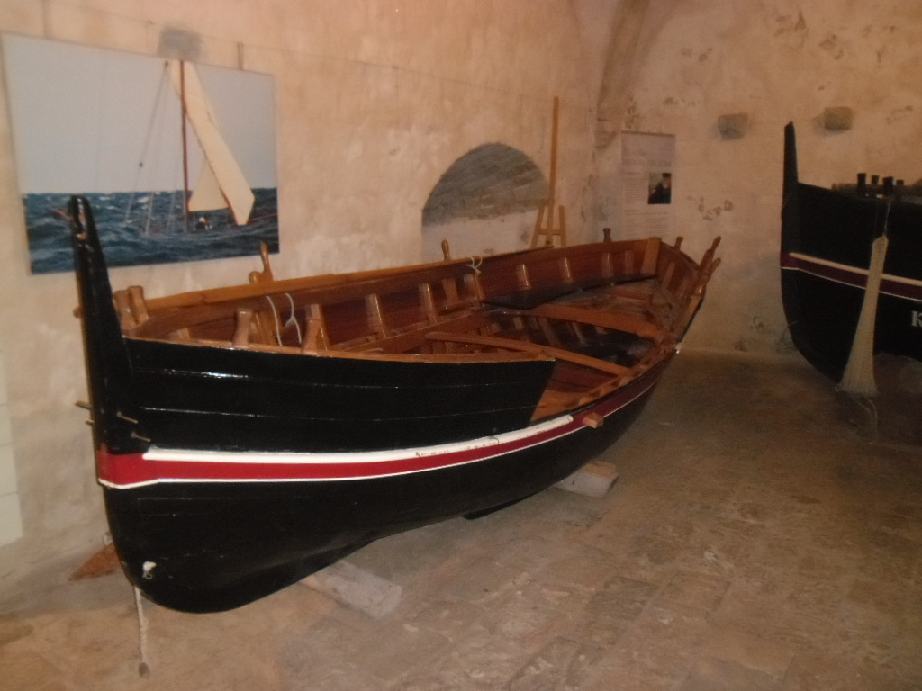 Komiža